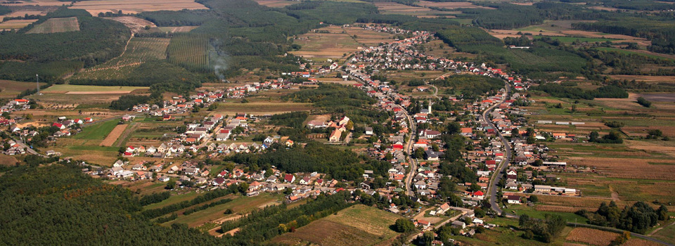 LégifotóNyírmártonfalva